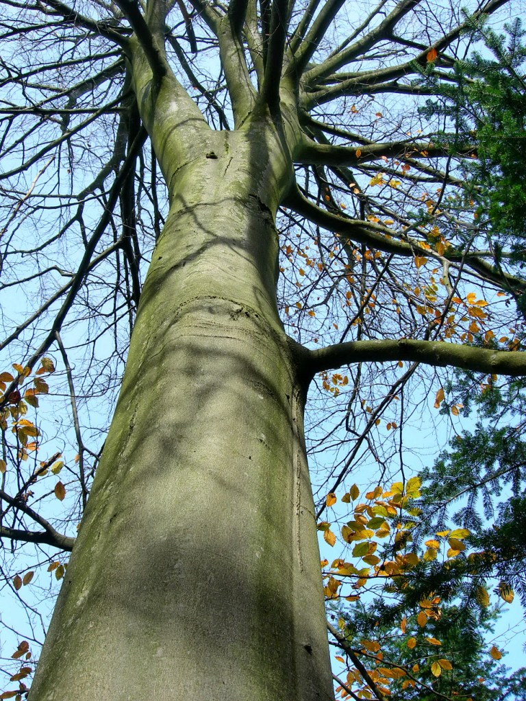 buk